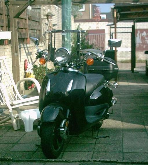 Honda Shadow Scooter, deze scooter is er als 50cc en 90cc (2takt) in Japan heet deze scooter niet Shadow, maar Joker.. intussen zijn er al 10tallen clones van deze scooter in china verschenen, als 100cc, 125cc en 150cc (4takt)